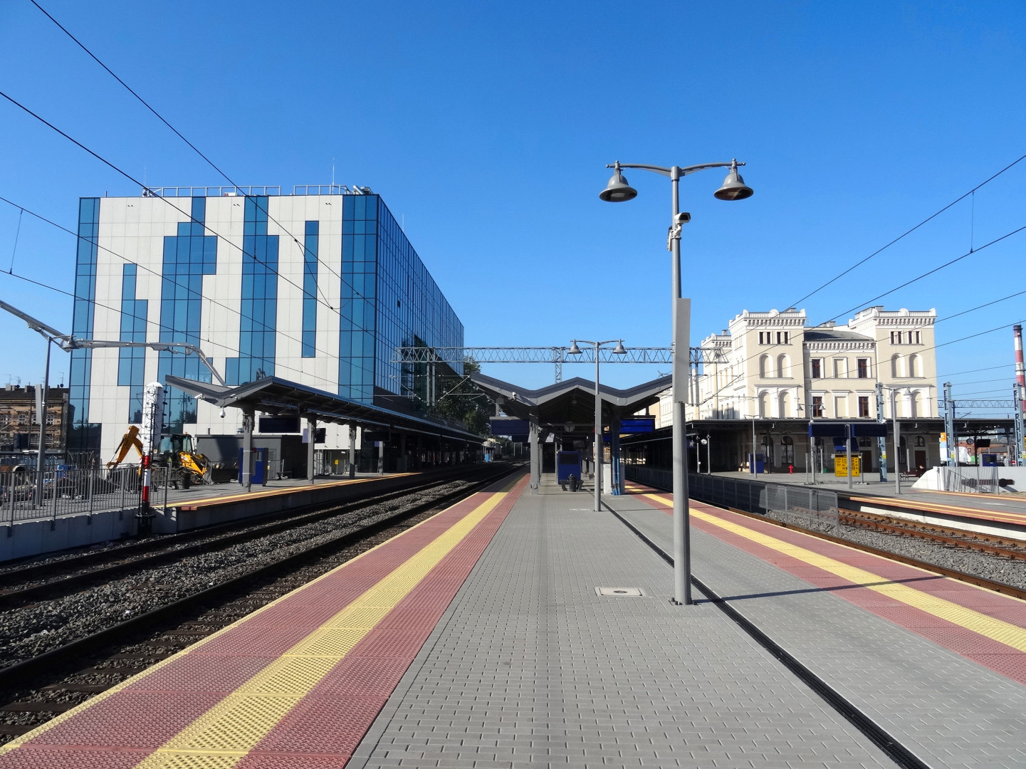 Dworzec kolejowy Bydgoszcz Główna